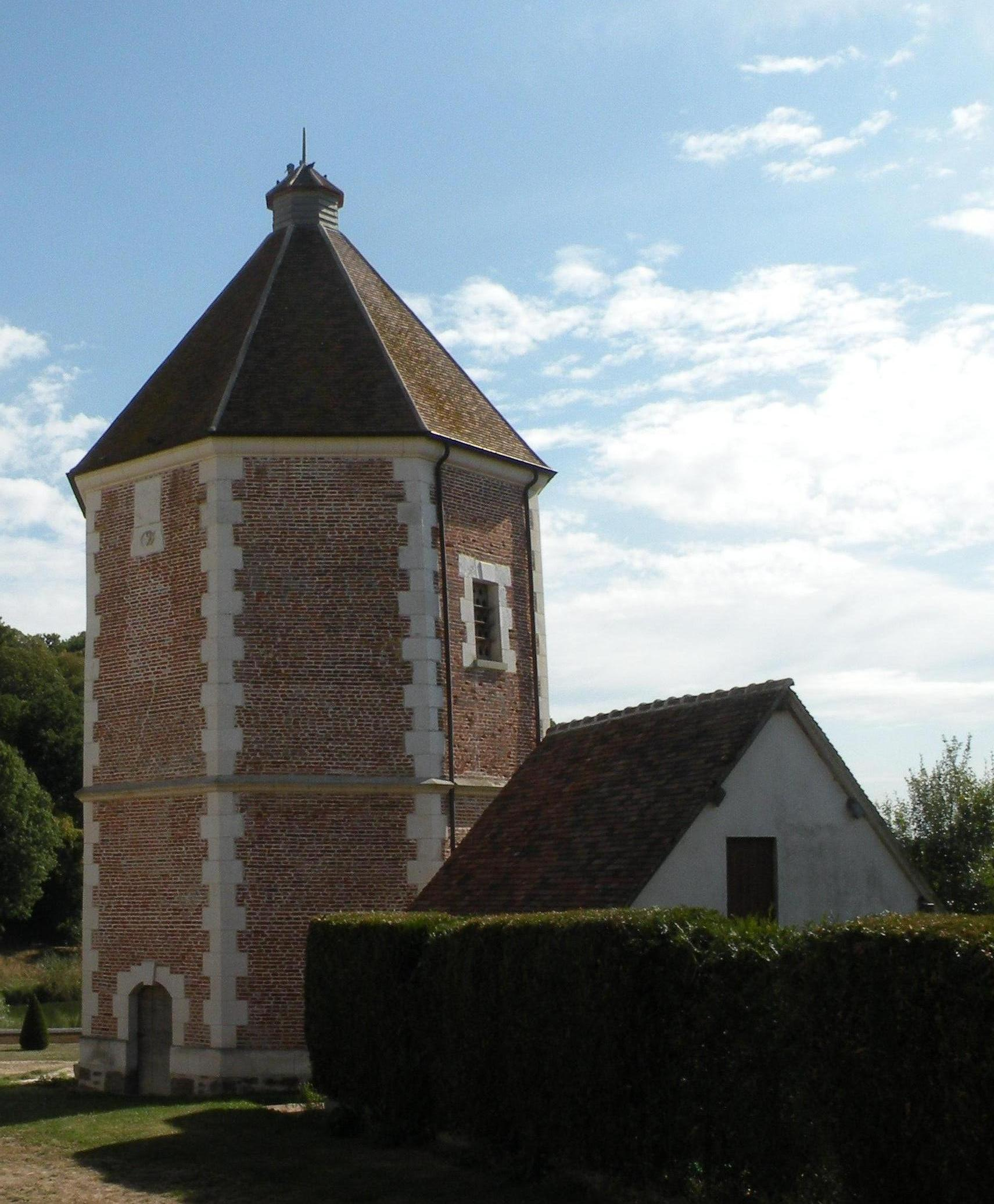 tour à Saint-Paul (Oise)